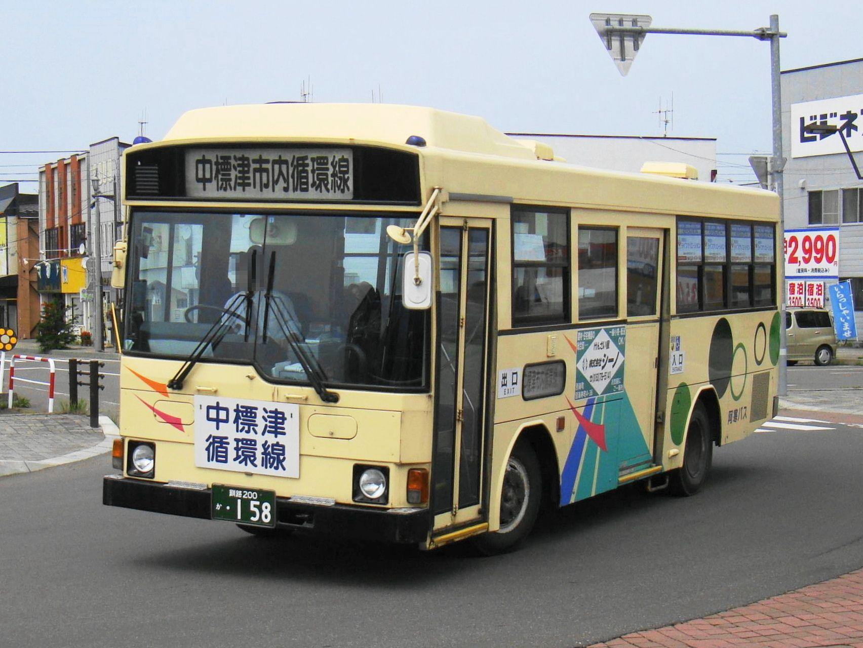 Naka-Shibetsu loop line